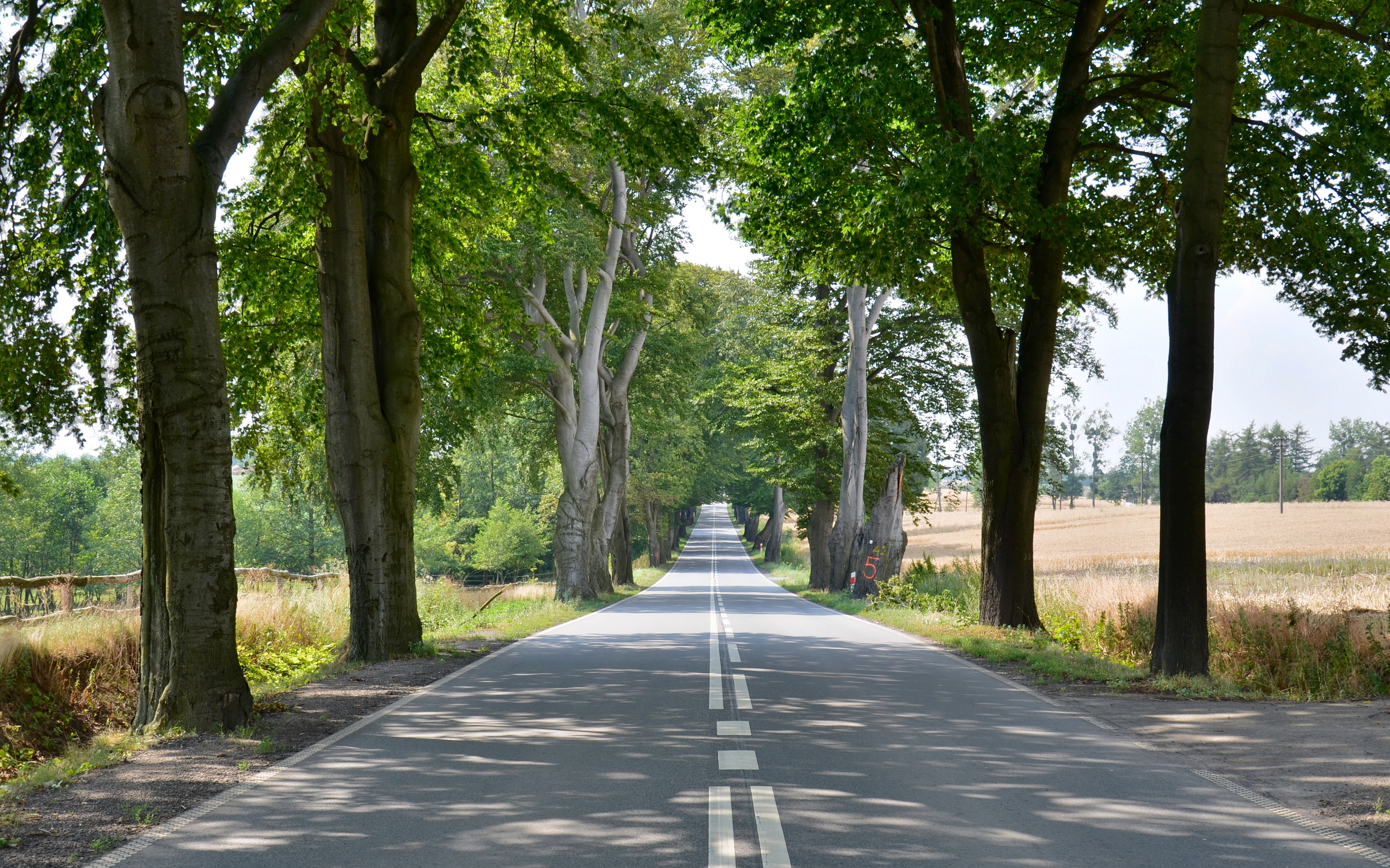 Zabytkowa aleja bukowa – pomnik przyrody o długości ok. 3 km. Wiek drzew szacowany jest na ok. 300 lat. Fragment drogi wojewódzkiej nr 534.